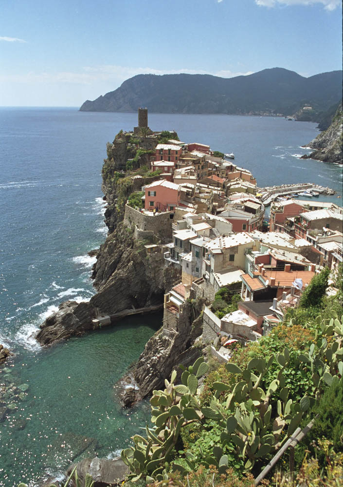 Vernazza, Cinque Terre, Italien